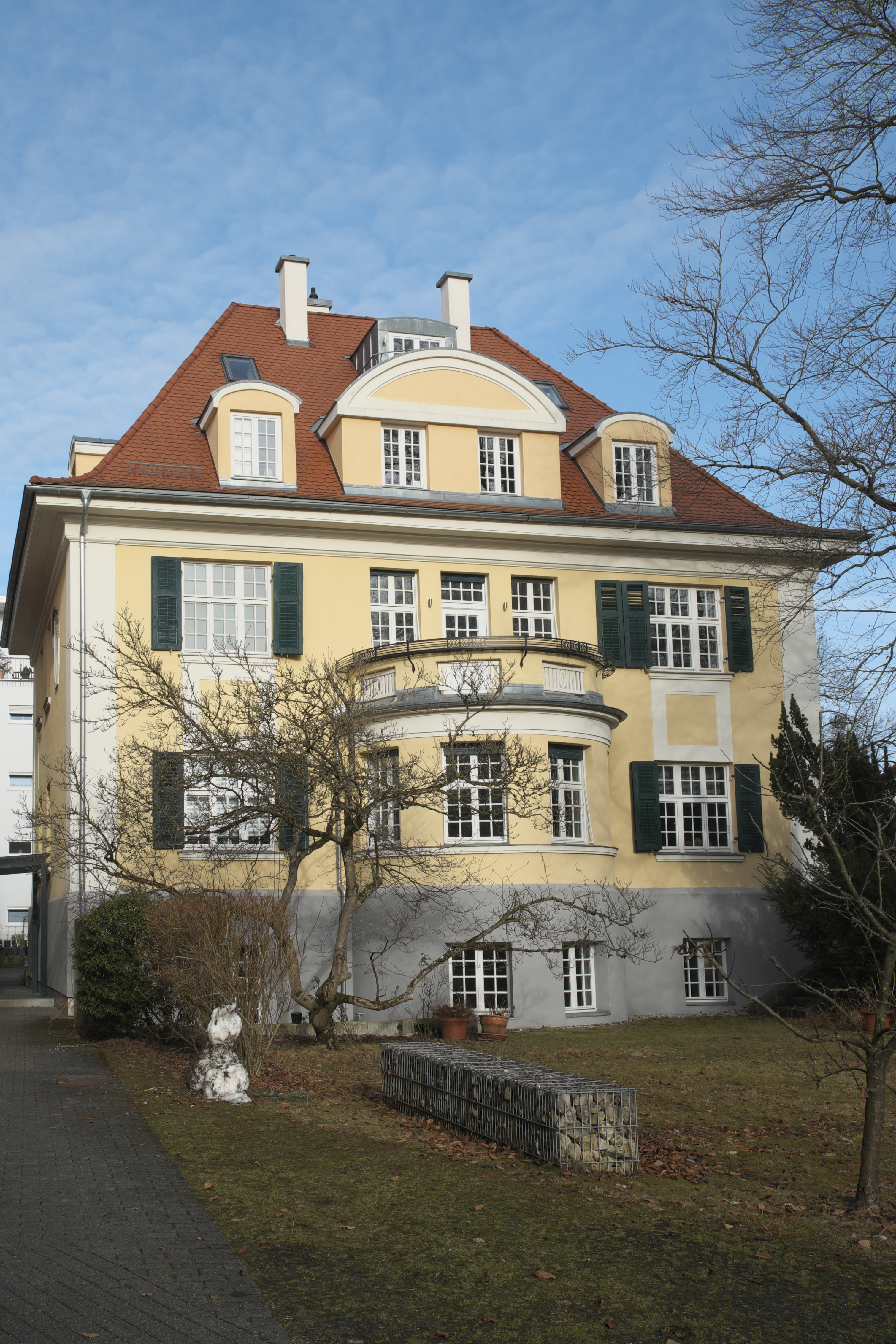 Villa, Planegger Straße 130, in Pasing im Stadtbezirk Pasing-Obermenzing in München (Bayern/Deutschland)